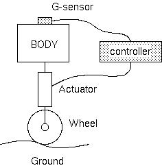 スカイフック理論を基にしたアクティブサスペンション